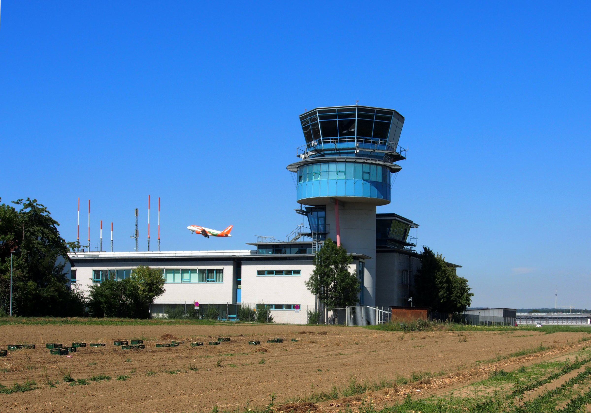 Tower des Flughafens Stuttgart in Bernhausen, gesehen vom Nord-Ost-Ring, mit startendem Flugzeug. Im Hintergrund der Fernsehturm.